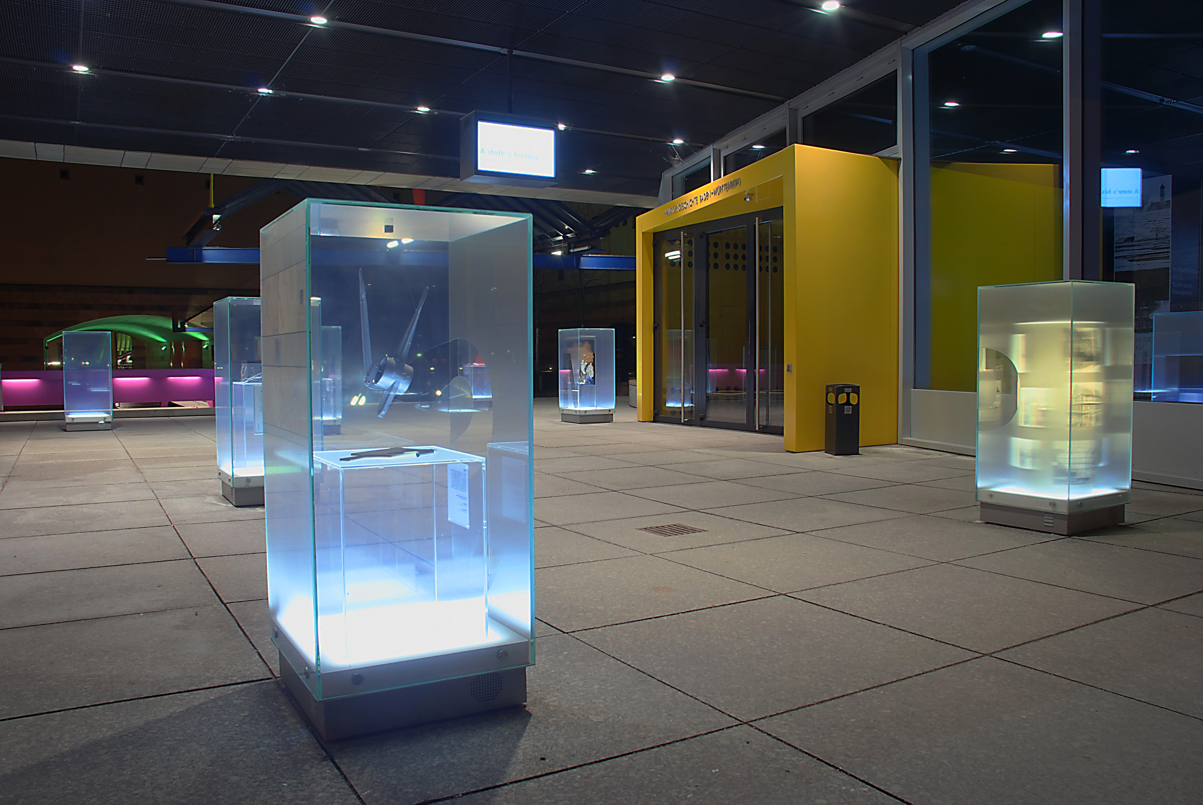 Haus der Geschichte Baden-Württemberg, Stuttgart. Eingangsbereich mit Vitrinen (HDR-Bild aus drei Aufnahmen, mit WebHDR erstellt)